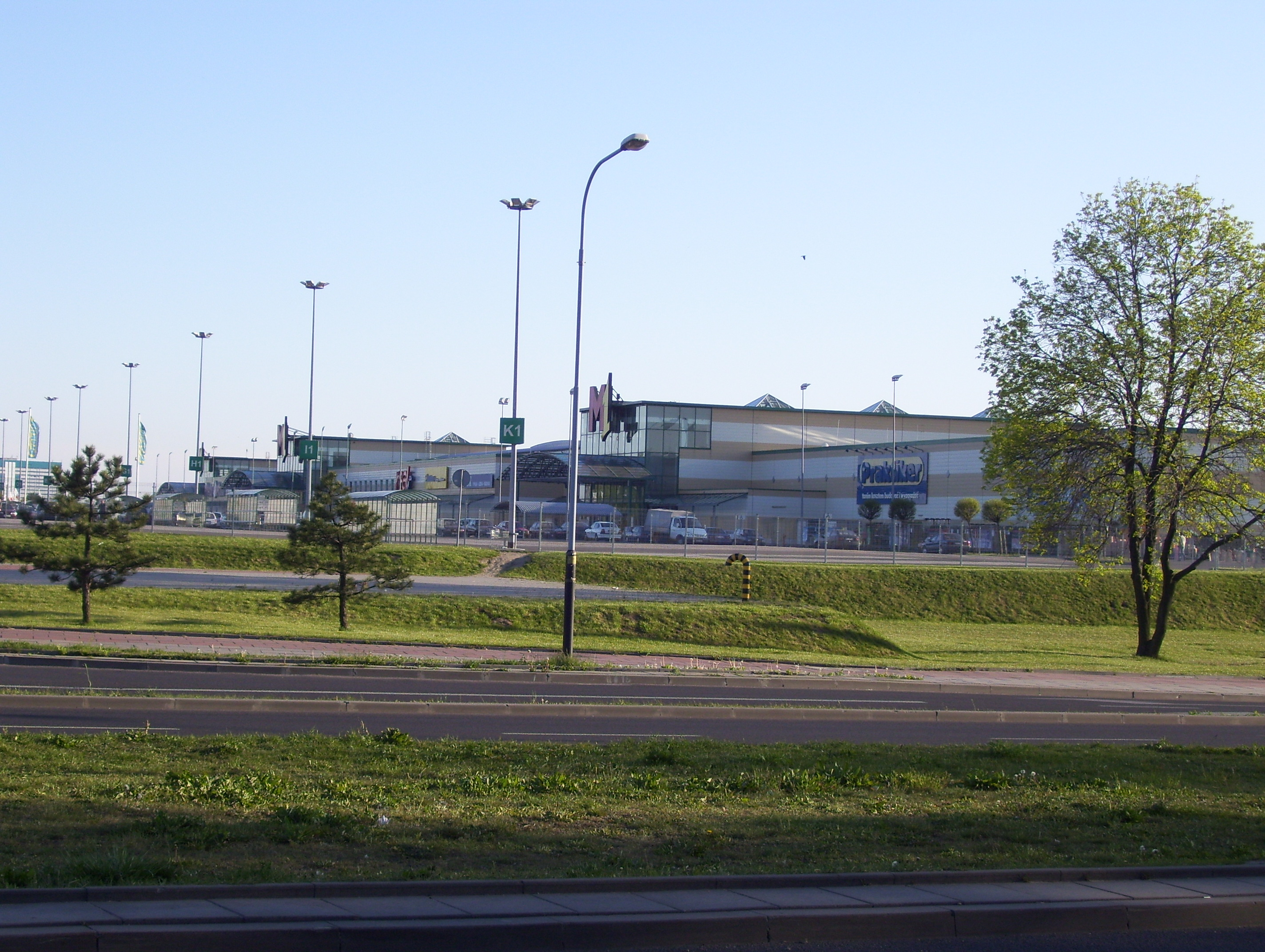 Centum handlowe M1.